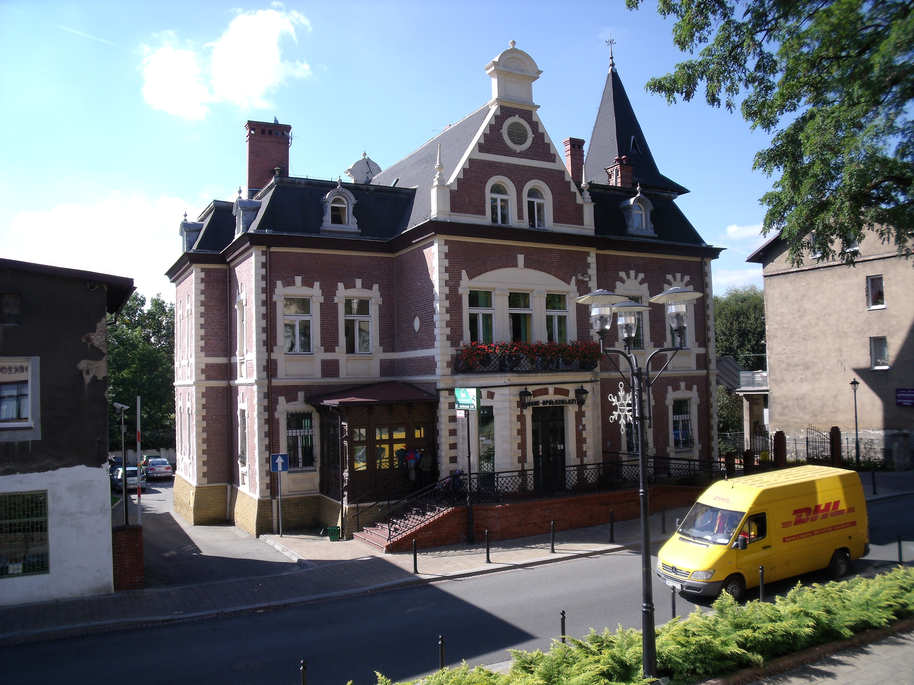 Bank Spółdzielczy.